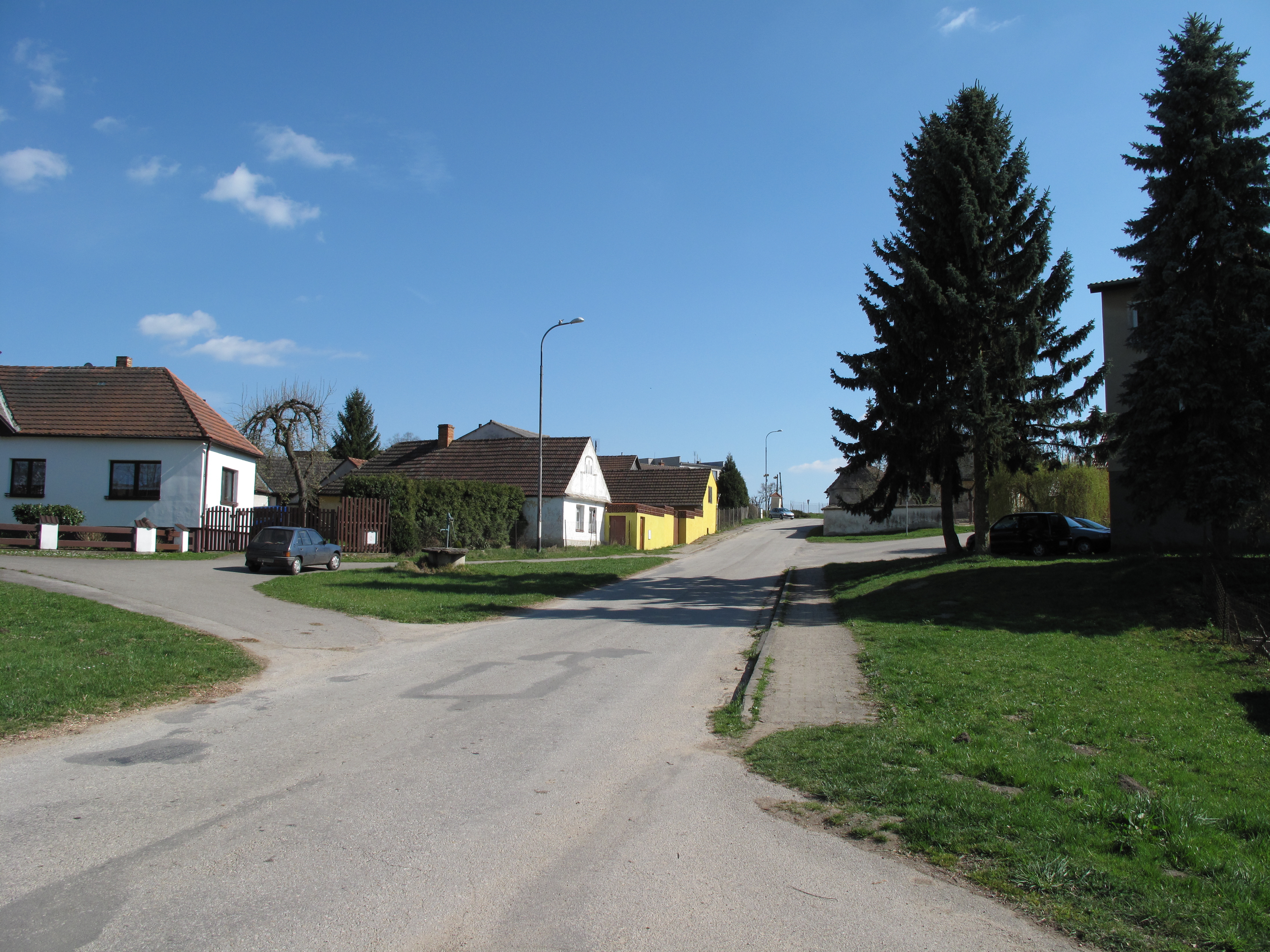 Rozcestí v Dobšicích. Okres České Budějovice, Česká republika.